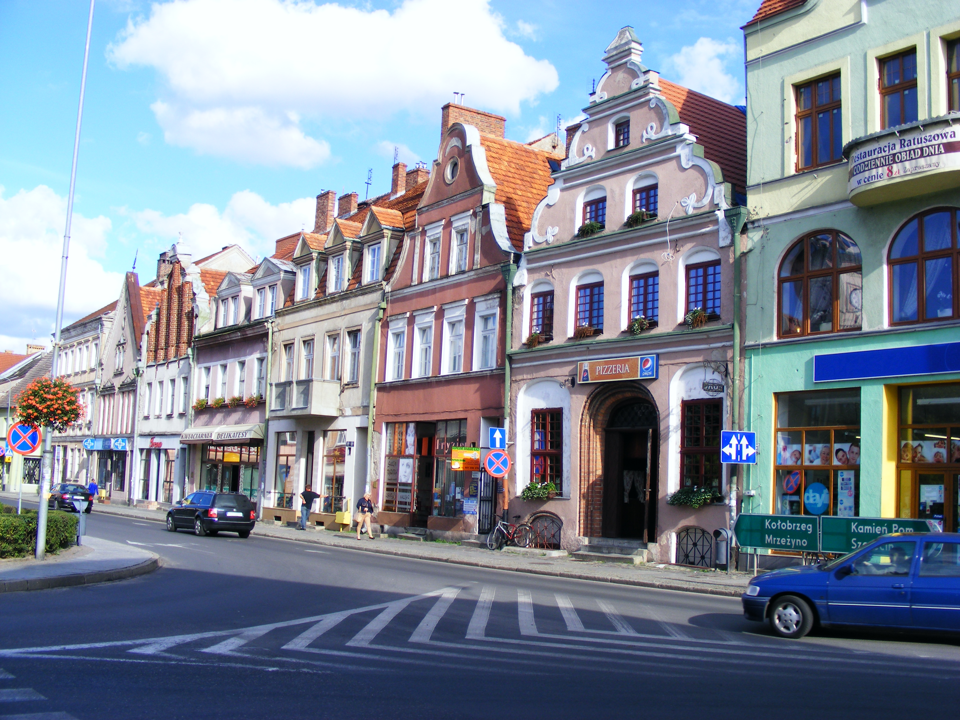 Domy. Trzebiatów, Rynek od prawej 26, 27,28, 30, 31, 32, 33.